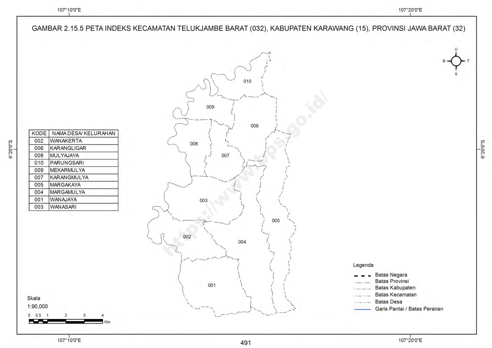 Peta Indeks Wilayah Kecamatan Telukjambe Barat Kabupaten Karawang, BPS 2010